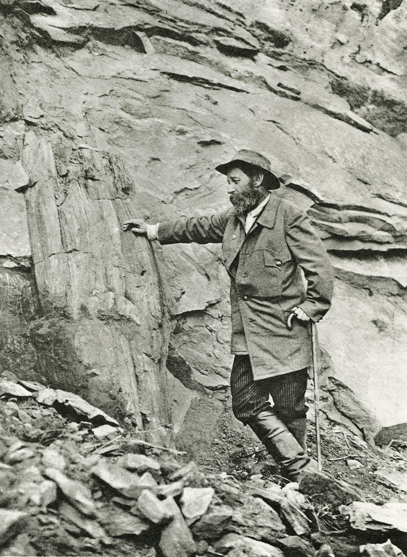 Лутугин, Леонид Иванович. Кузнецкий угольный бассейн.